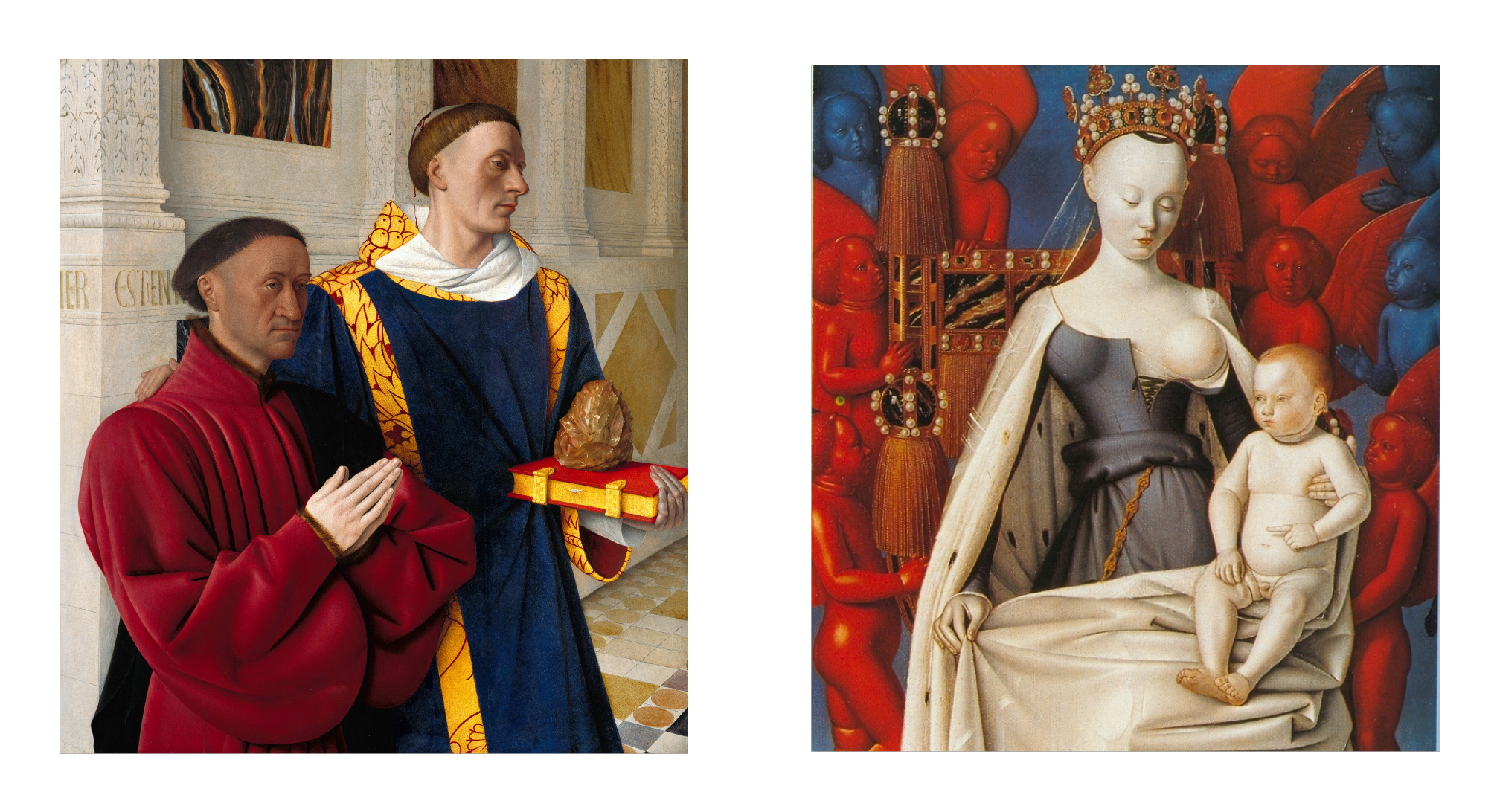 Espacement des panneaux estimé par la perspective. Autrefois à la collégiale Notre-Dame de Melun, dans le chœur